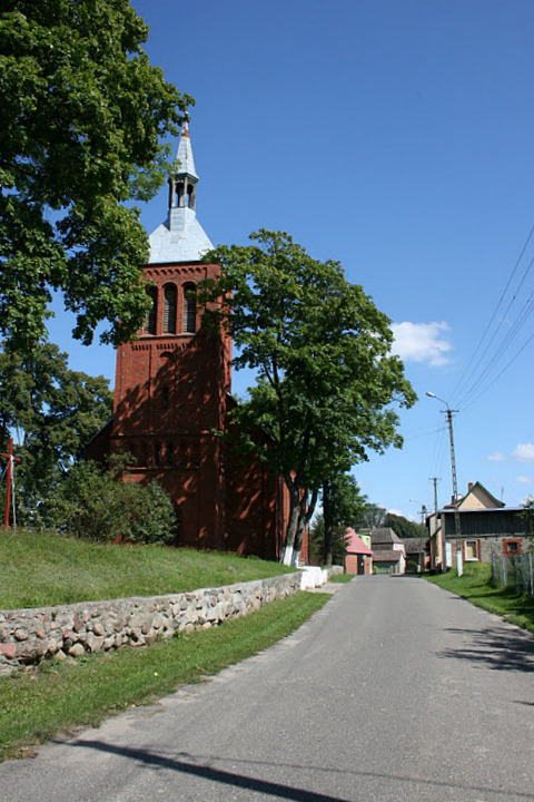 Wrześnica - rzymskokatolicki kościół filialny pw. MB Pocieszenia.